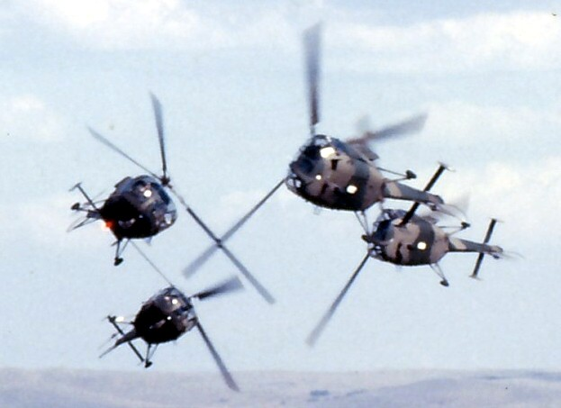 Alouette III at CFS Dunnottar during Harvard 50